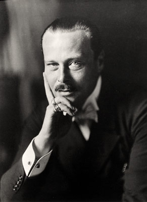 Portrait of Großherzog Ernst Ludwig von Hessen (1868–1937)